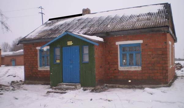 Туменська бібліотека шкільний відділ